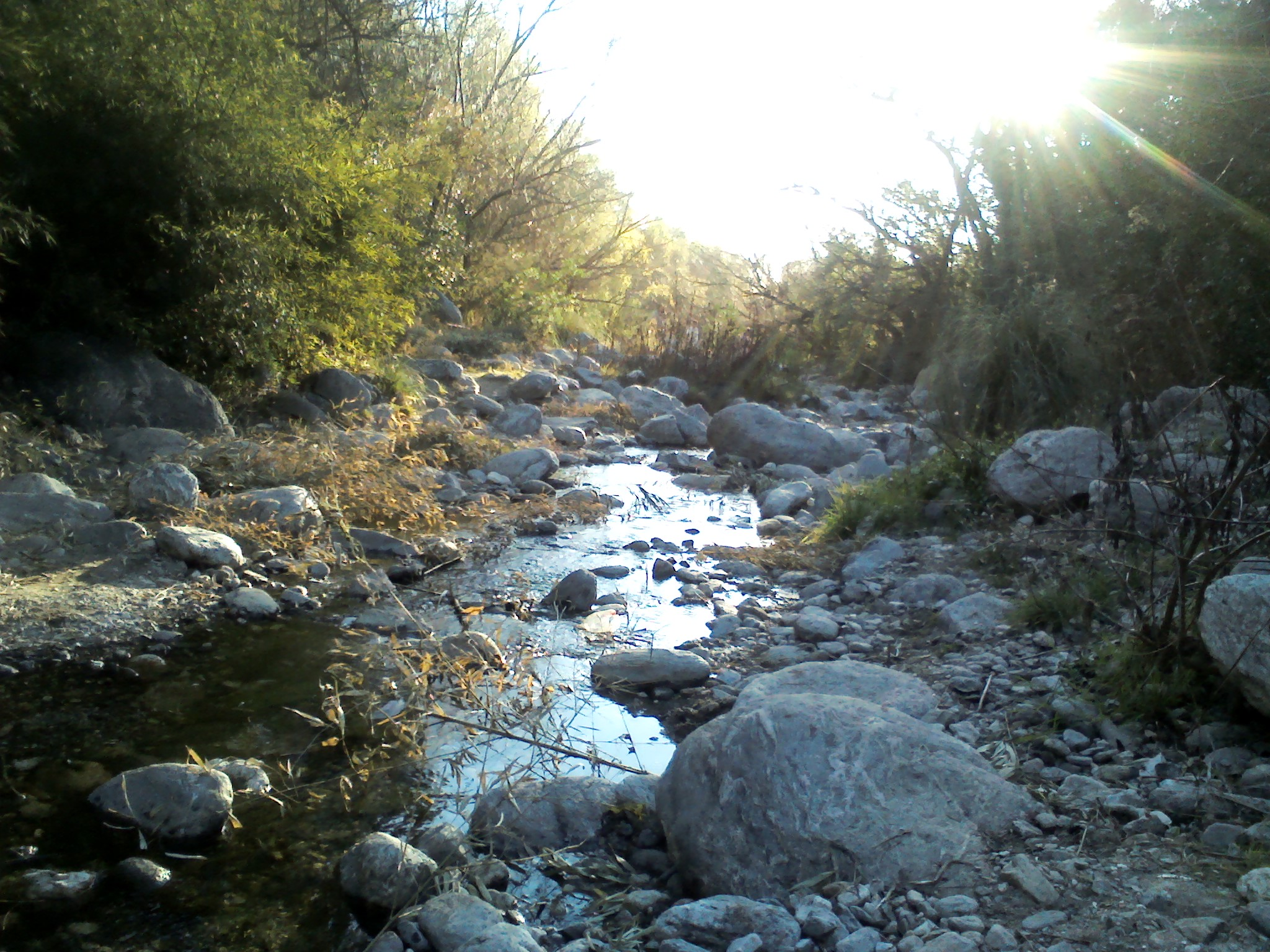 Vista del curso medio del arroyo puntano y cordobés Piedras Blancas. Cerca de Merlo, San Luis, Argentina. La imagen fue sacada mirando hacia el oeste, por lo que San Luis (al sur) esta a la izquierda y Córdoba (al norte) a la derecha.